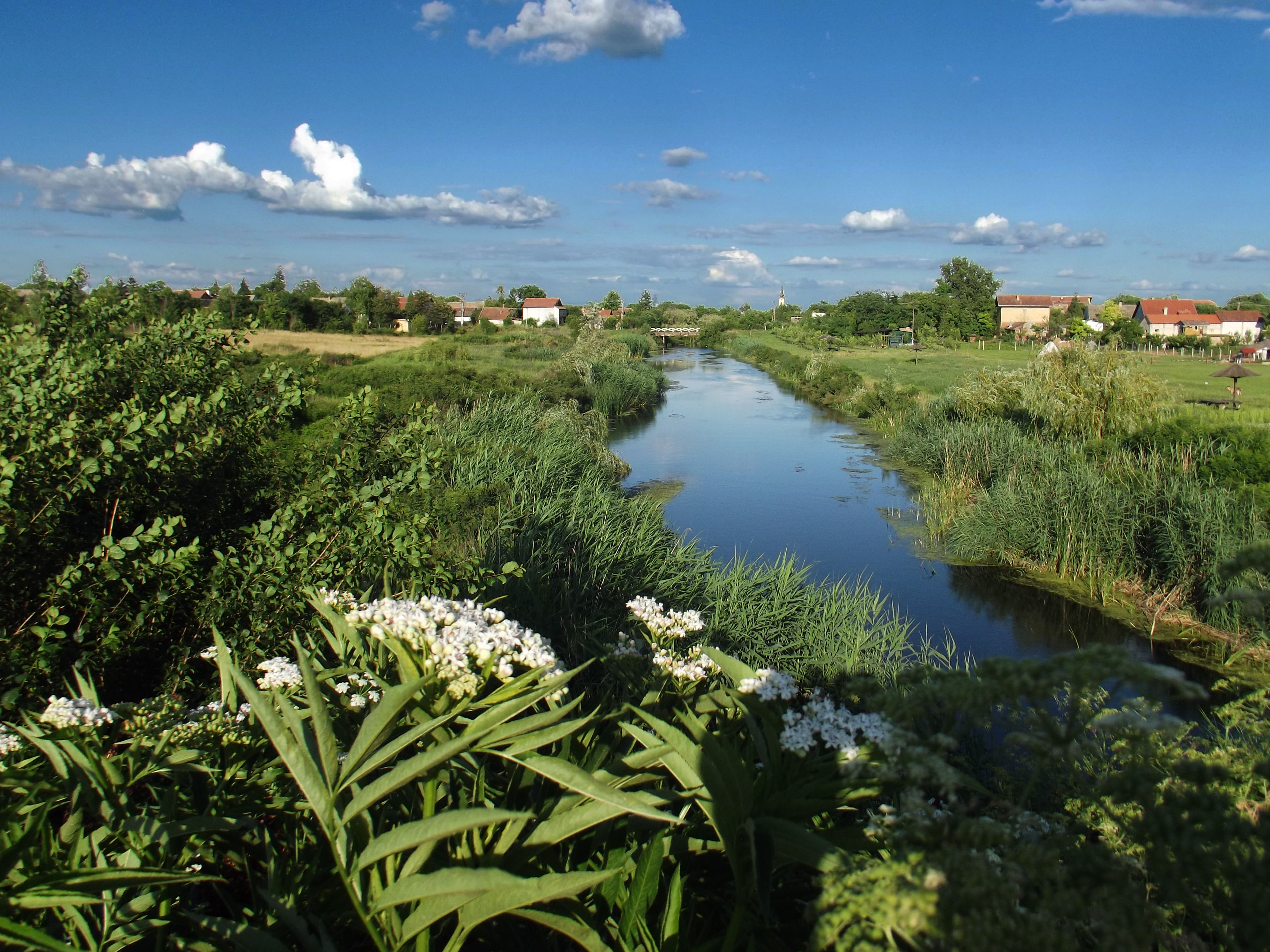 Srpski (latinica): Ово је фотографија заштићеног природног добра у Србији под шифром: ПП02 This is a a photo of a natural area in Serbia with ID: ПП02 Park prirode Jegrička u Zmajevu, opština Vrbas.